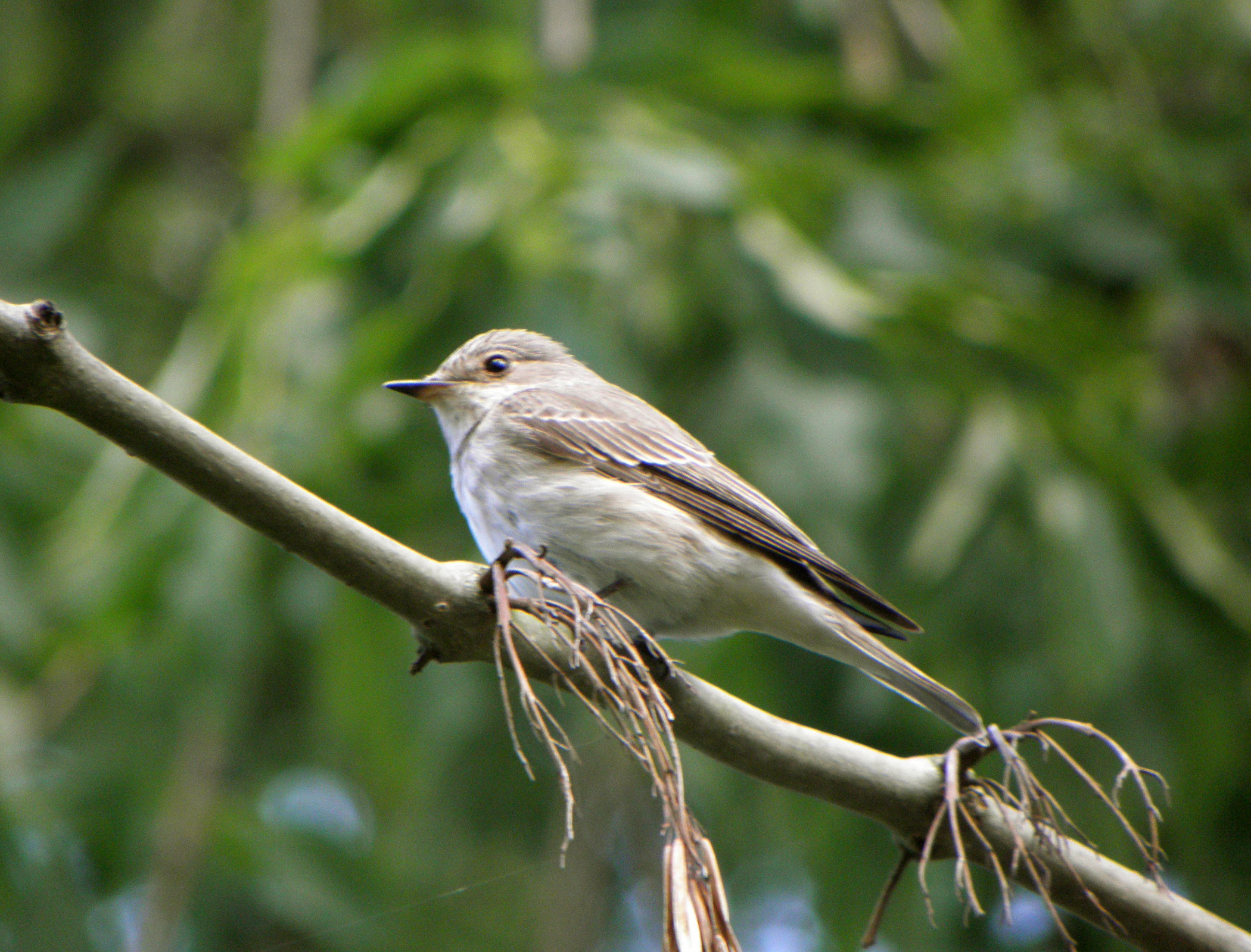 Muscicapa striata